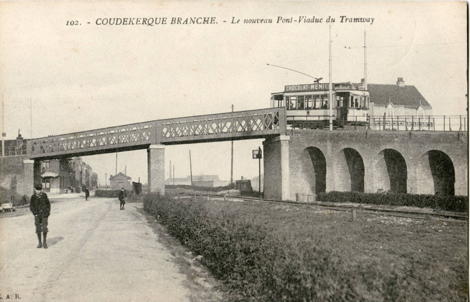 Carte postale ancienne éditée par CAR, n°102 : COUDEKERQUE-BRANCHE - Le nouveau pont-viaduc du Tramway